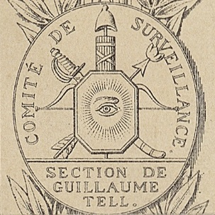 Armes de la section révolutionnaire de Guillaume-Tell